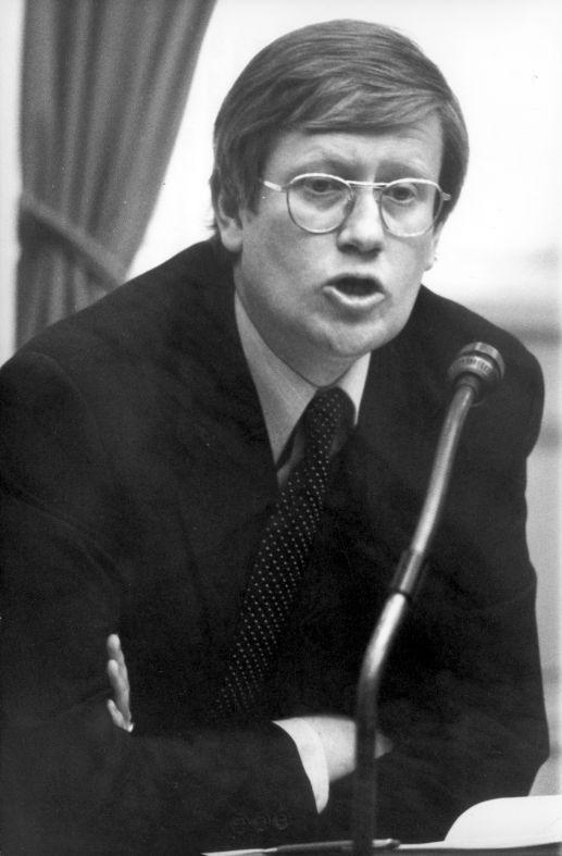 Hans Wiegel, 1978